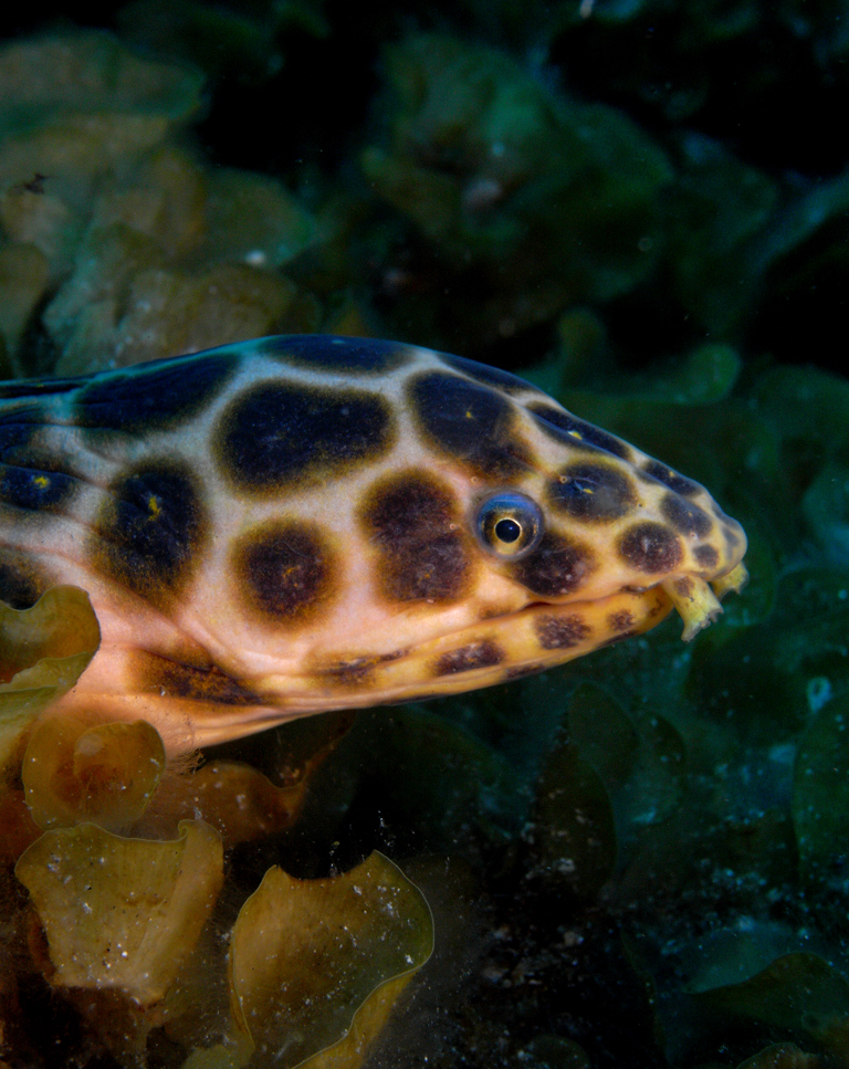 Myrichthys pardalis - Leopard eel / Carmelita / Anguille léopard, el Hierro.